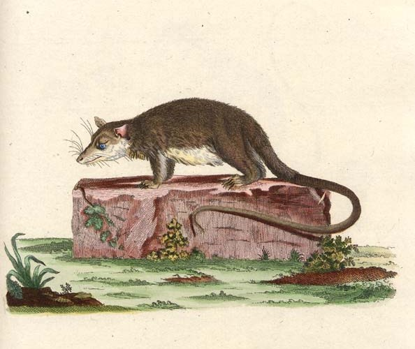 Caluromys philander, described as Didelphis cayopollin, plate from Johann Christian Daniel von Schreber, Histoire naturelle des quadrupèdes représentés d´après nature. Tome III. Le phoque, le chien, le chat, le putois, la loutre, la marte, l'ours, le didelphe, la taupe, la souris, le hérisson, à Erlangen, chez Wolfgang Walther, 1780